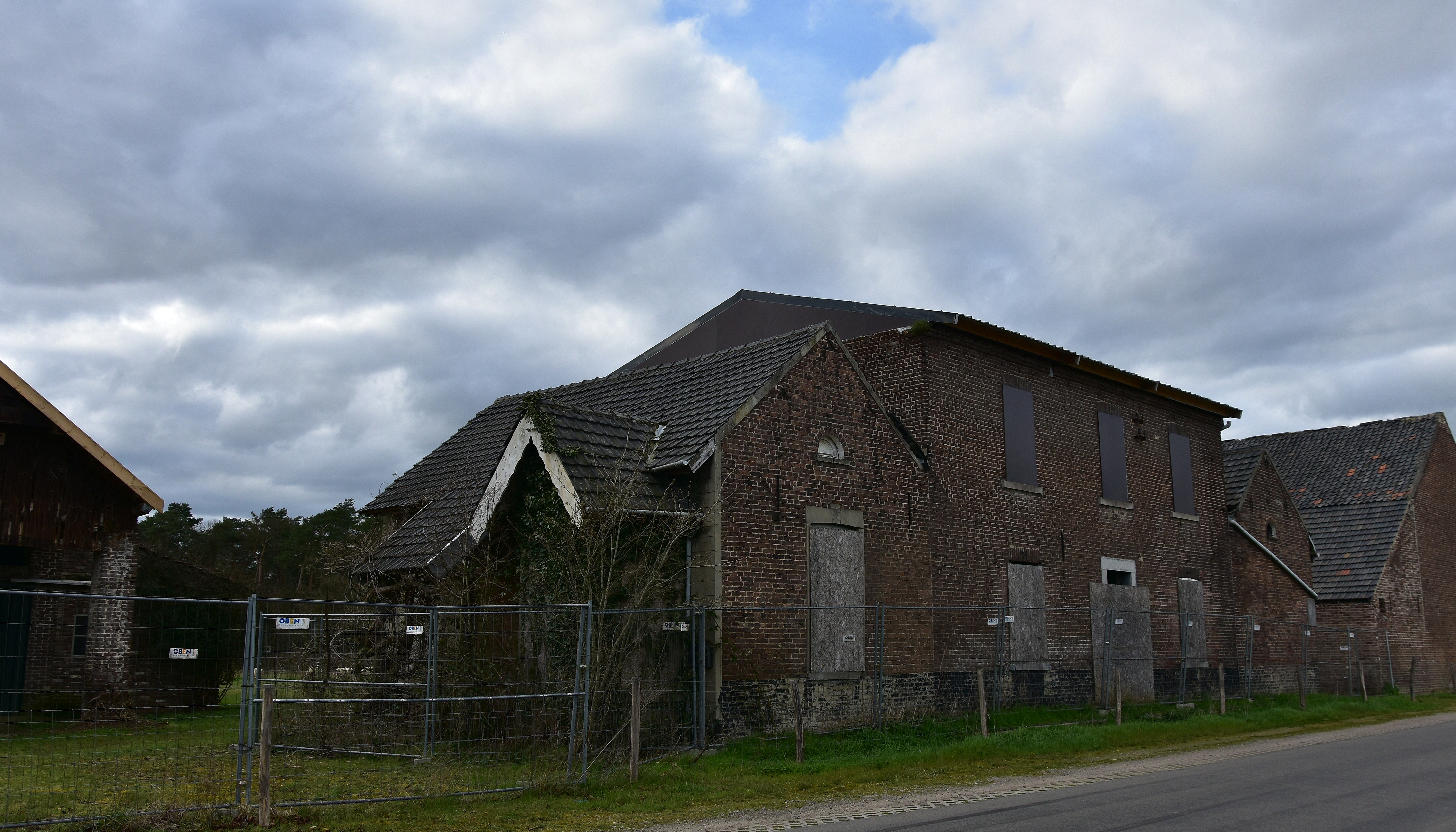 Elen Georges Simenon Dijkmeesterswoning Luikerhuis in de Heide Watering 1 (71384) 16-03-2020 15-44-45